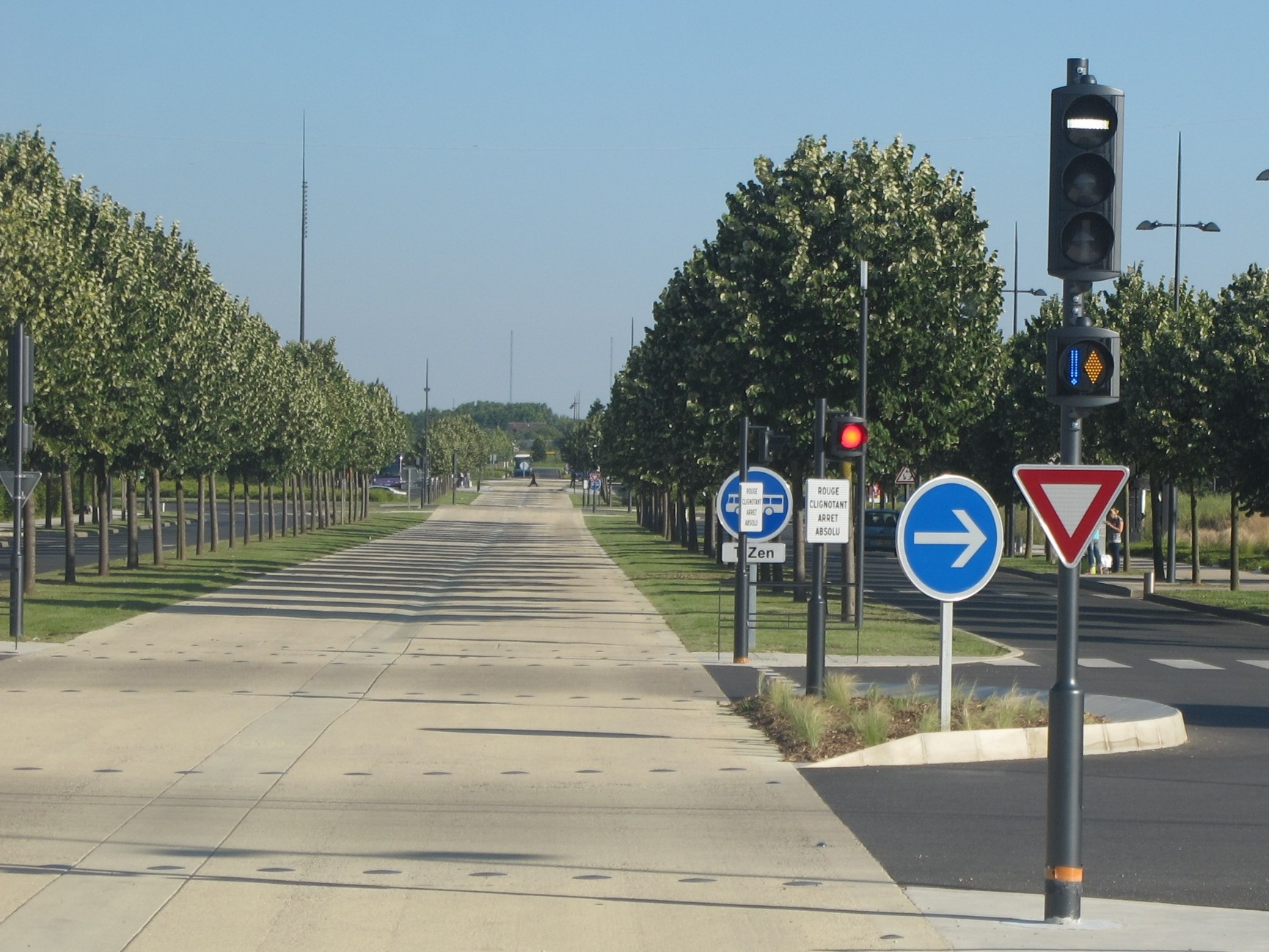 Parcours T-Zen ligne 1 - section en site propre entre les stations Carré-Canal et Carré-Trait-d'Union ; Lieusaint, Seine-et-Marne, France